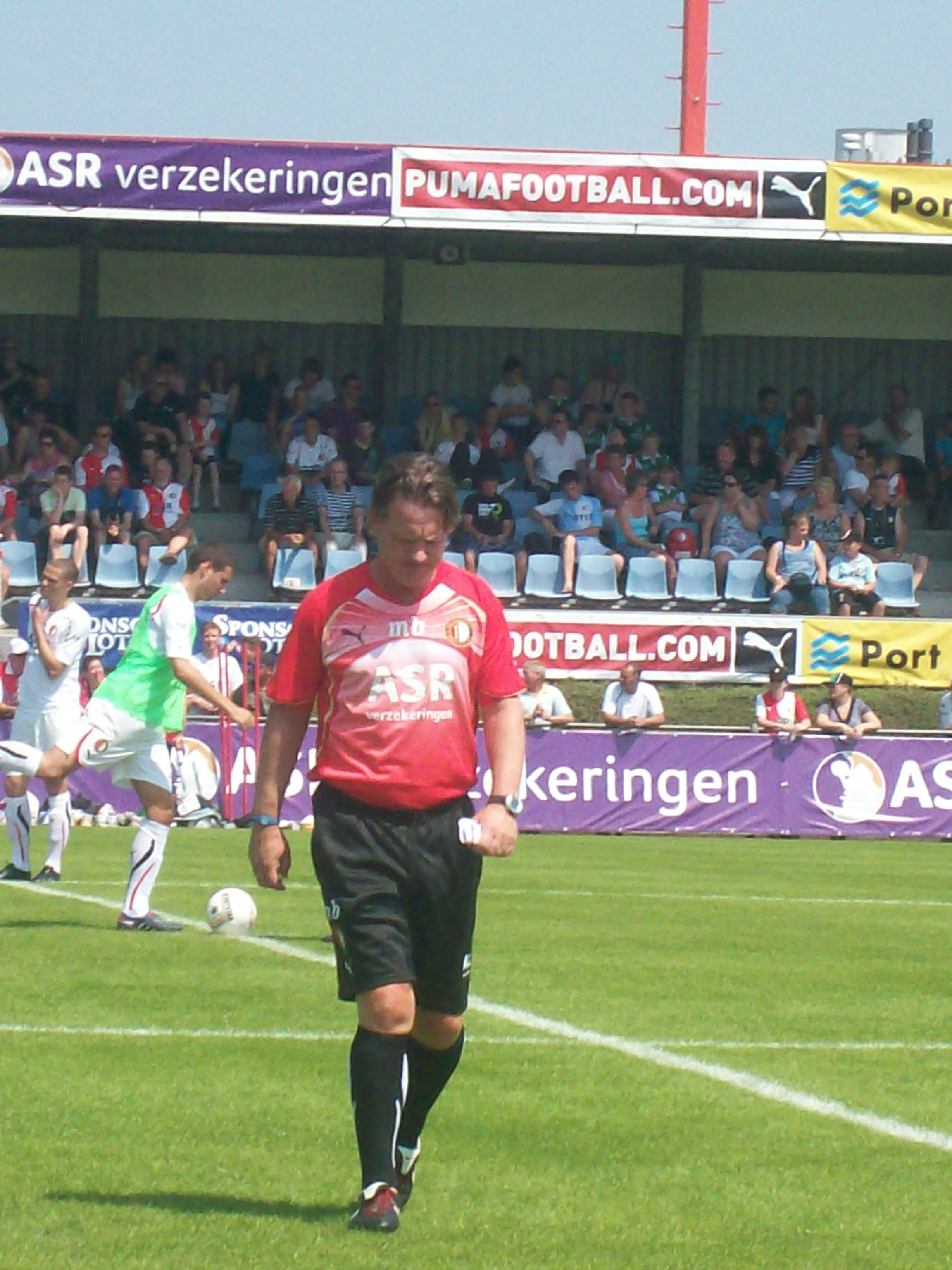 Mario Been tijdens de eerste training van Feyenoord